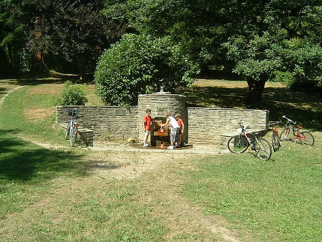 öffentlich zugängige Heilquelle, Mineralquelle in Kronberg am Taunus bei den Kronthaler Quellen.